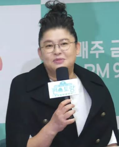 25일 오전 서울시 영등포구 여의도동 KBS에서 KBS 새 예능 '신상출시 편스토랑' 제작발표회가 열려 PD의 프로그램 소개와 출연자들이 출연 소감에 대해 이야기하고 있다.